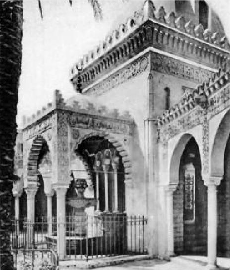 Oran - Mosquée du pacha - Cour et fontaine des ablutions